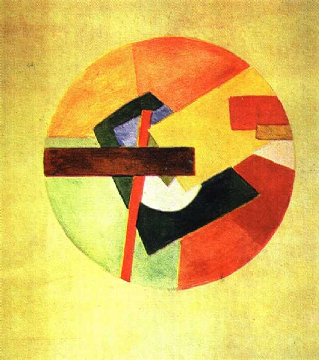 Клюн Иван Васильевич. Супрематический рисунок. 1920-е.